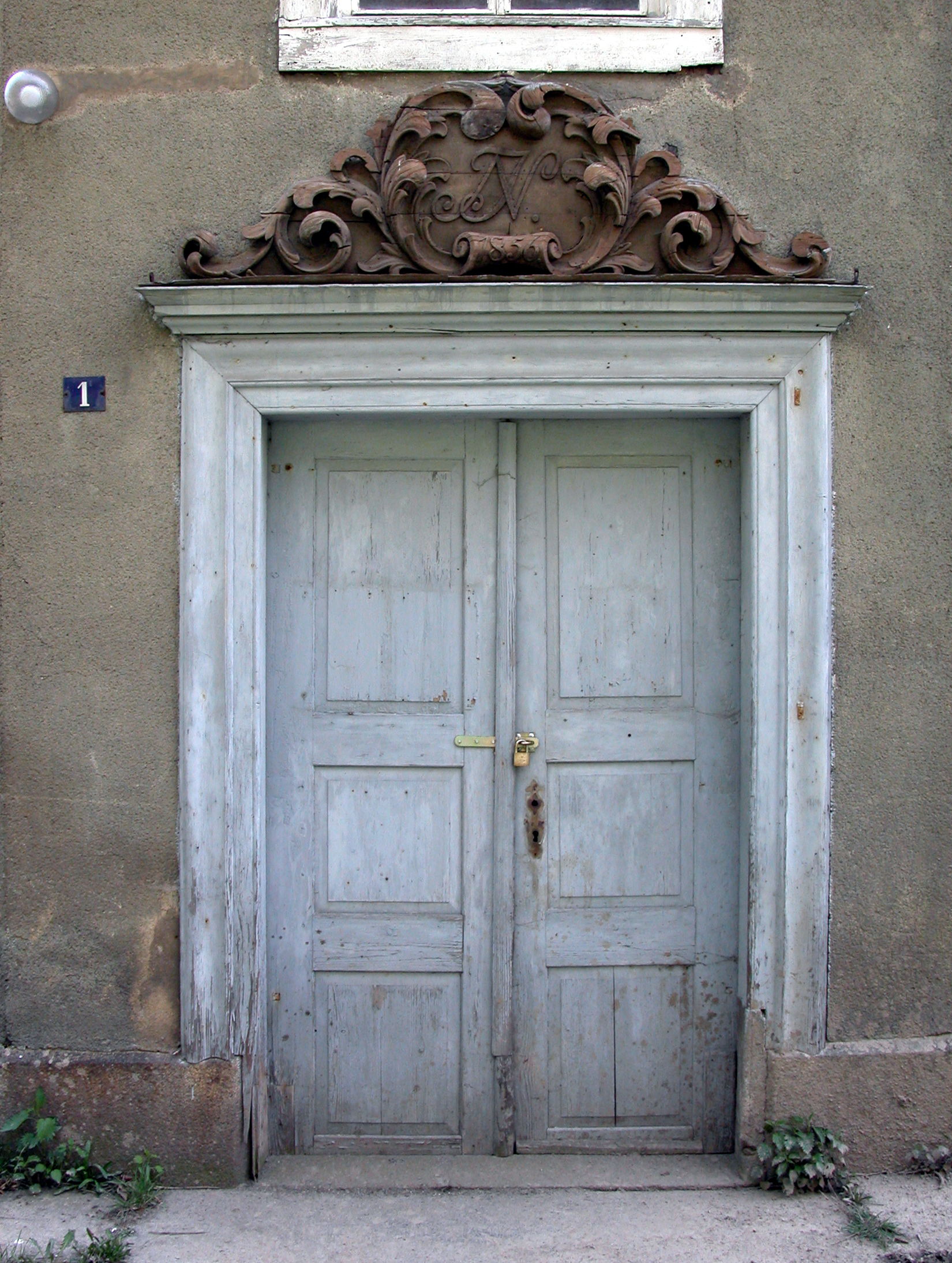 28.04.2008 02736 Picka (Oppach), Am Galgenberg 1 (GMP: 51.071495,14.481075): Herrenhaus, ehem. Vorwerk des Ritterguts Oppach, 1856 umgebaut zum Sommerhaus und Jagdsitz, "Schlössel" genannt. Supraporte mit den Buchstaben N und J (von Nostitz und Jänckendorf). [DSCN32486.TIF]20080428225.JPG(c)Blobelt